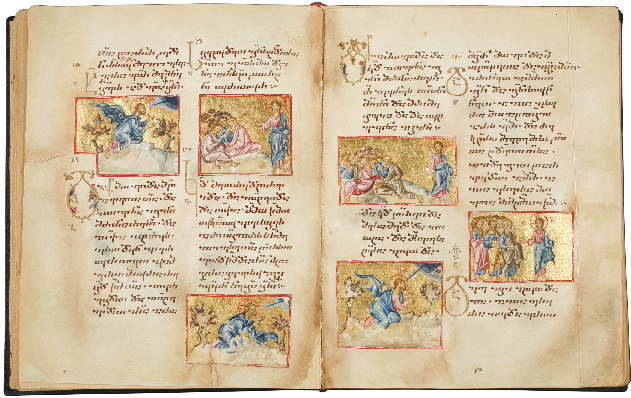 მოქვის ოთხთავი